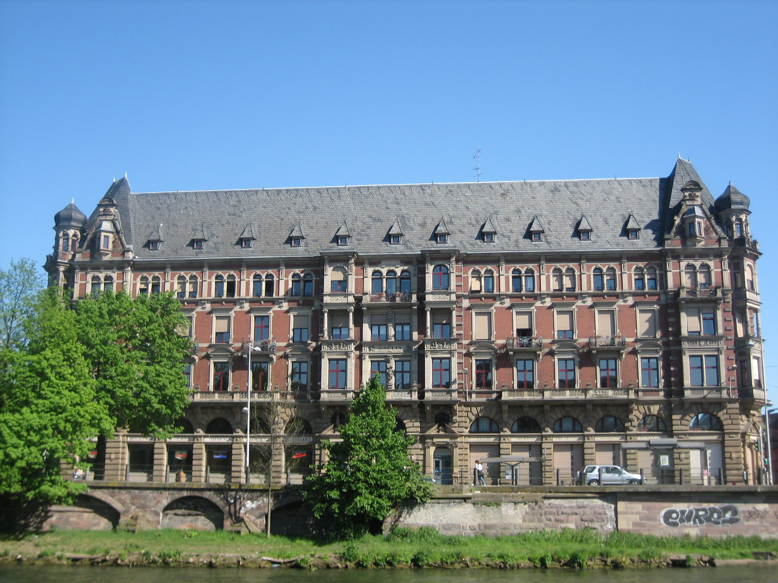 Le batiment Gallia (architecture Wilhelmienne) à Strasbourg, siège du CROUS